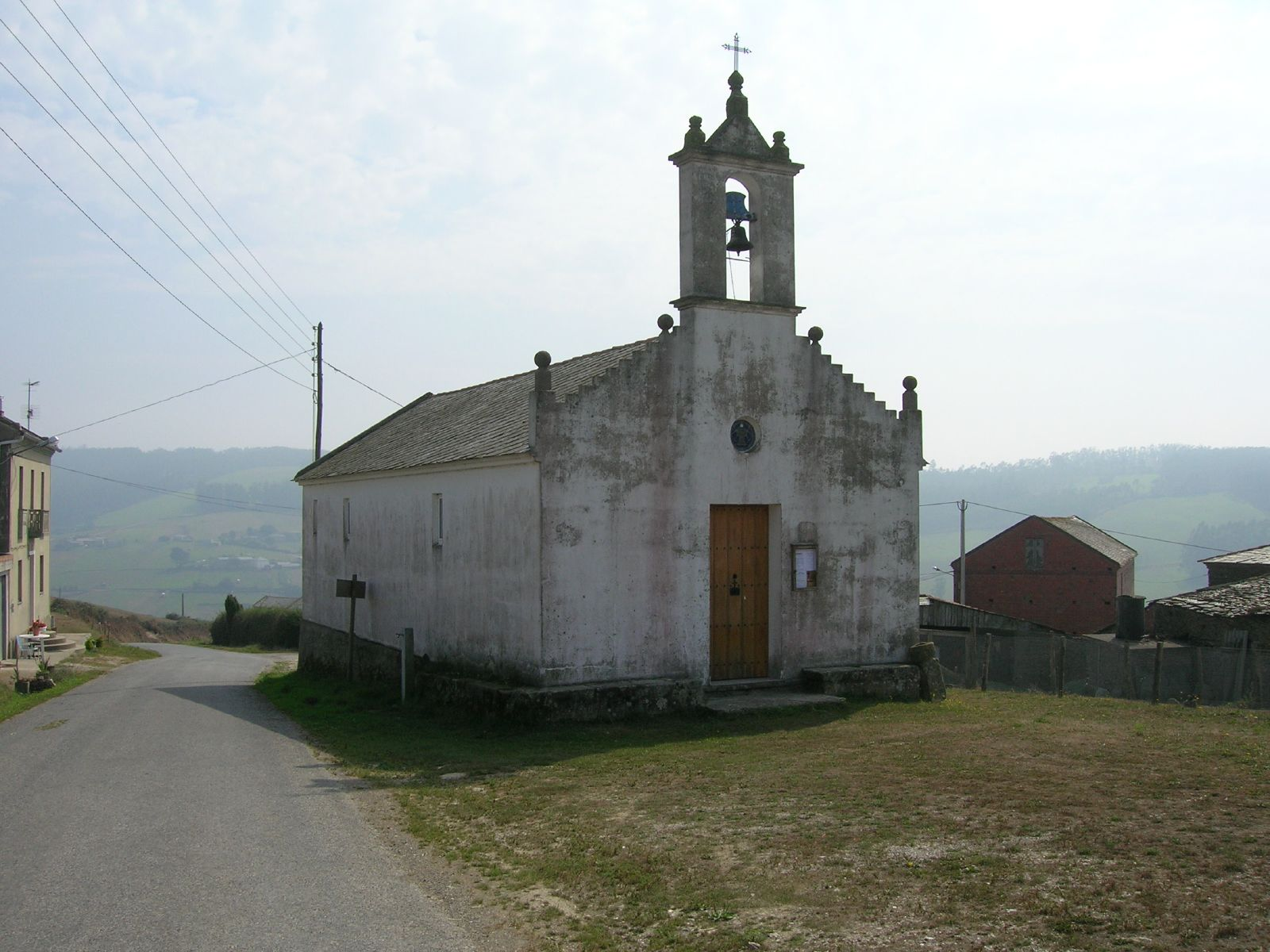 Ermida do Carme en Vilamartín Grande, Cabarcos, Barreiros